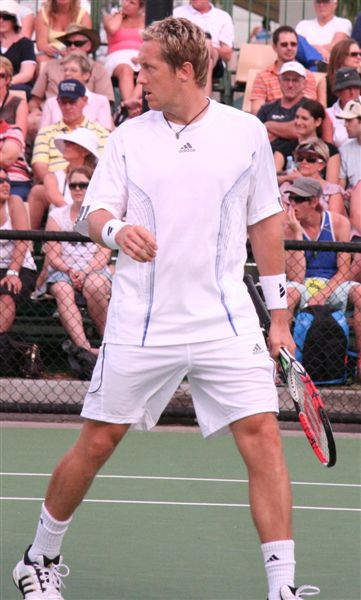 Jonas Björkman - 2007 Australian Open